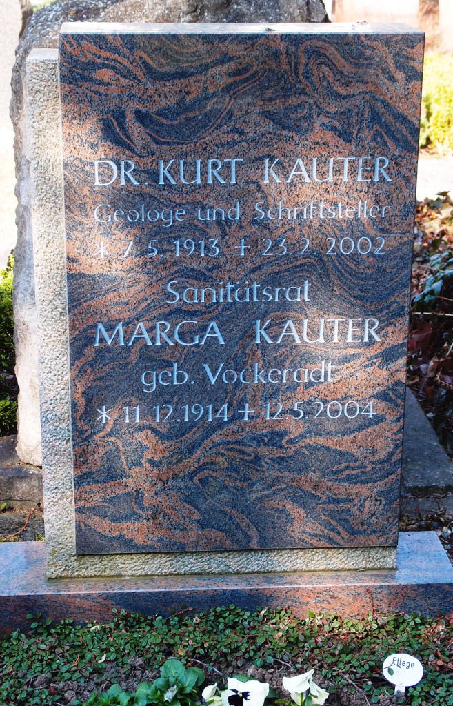 Grab des Geologen und Schriftstellers Kurt Kauter (1913-2002) auf dem Hauptfriedhof in Gotha